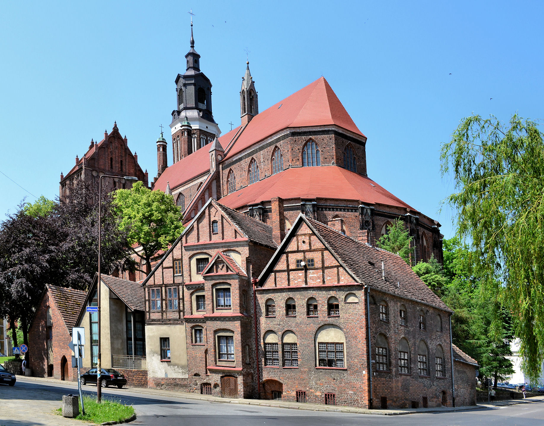 Plebania - Kolegiaty NMP w Stargardzie Szczecińskim